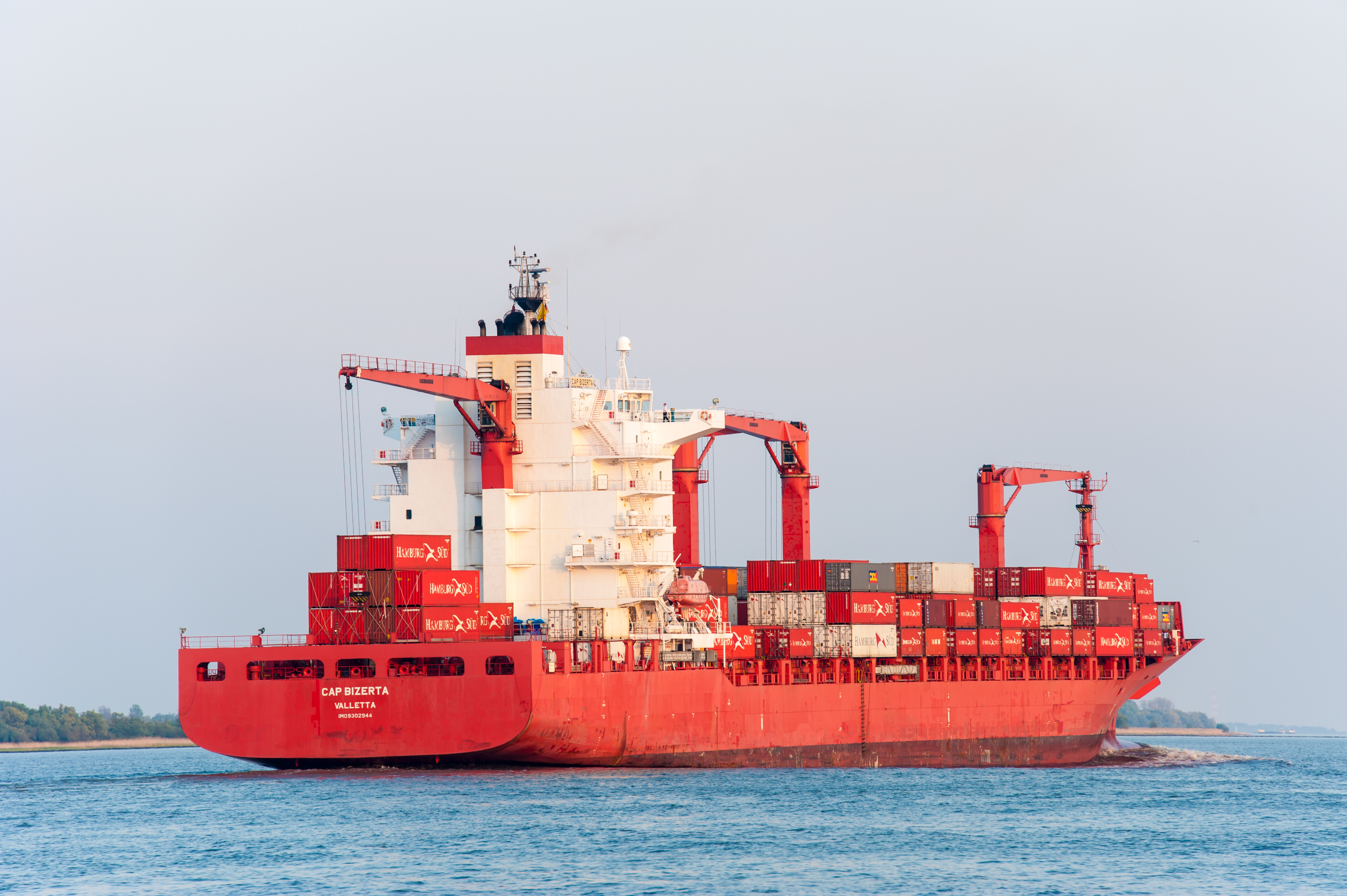 Containerschiff "Cap Bizerta" (IMO9302944), seit 2012 "Margarete Schulte", im Frühjahr 2011 auf der Elbe bei Glückstadt